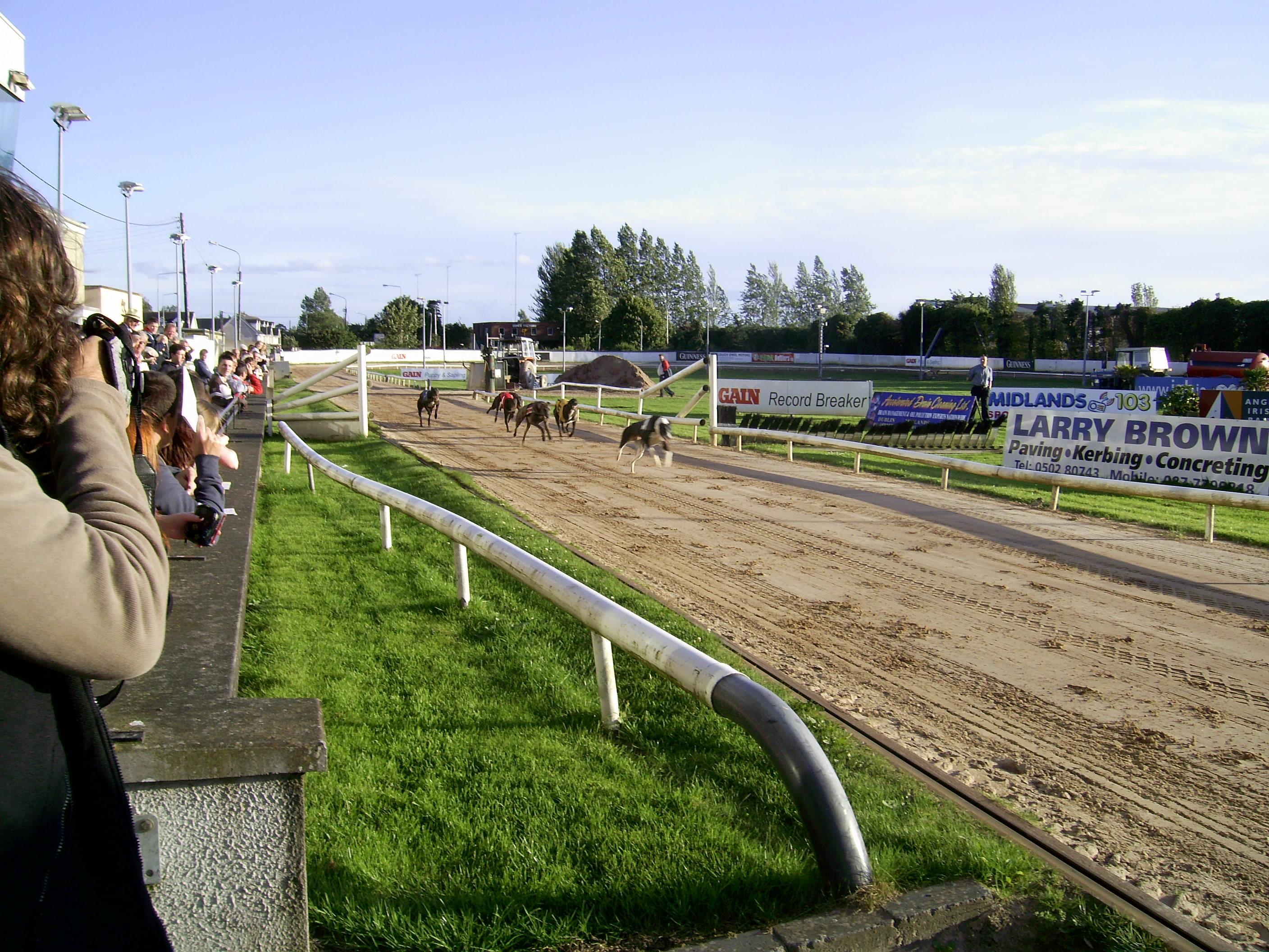 Les courses des levriers à Mullingar, juillet 2008